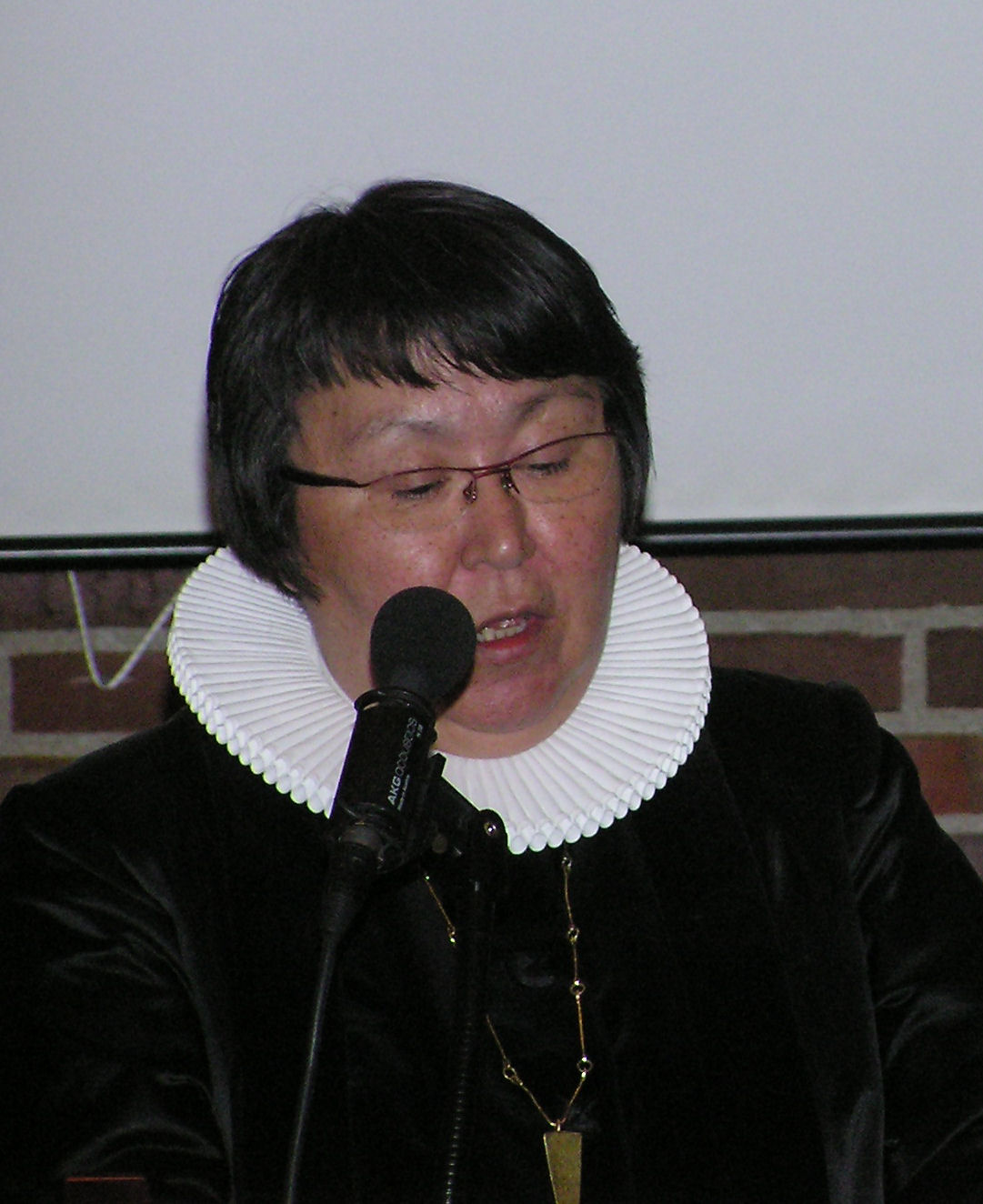 Bishop Sofie Petersen, Greenland